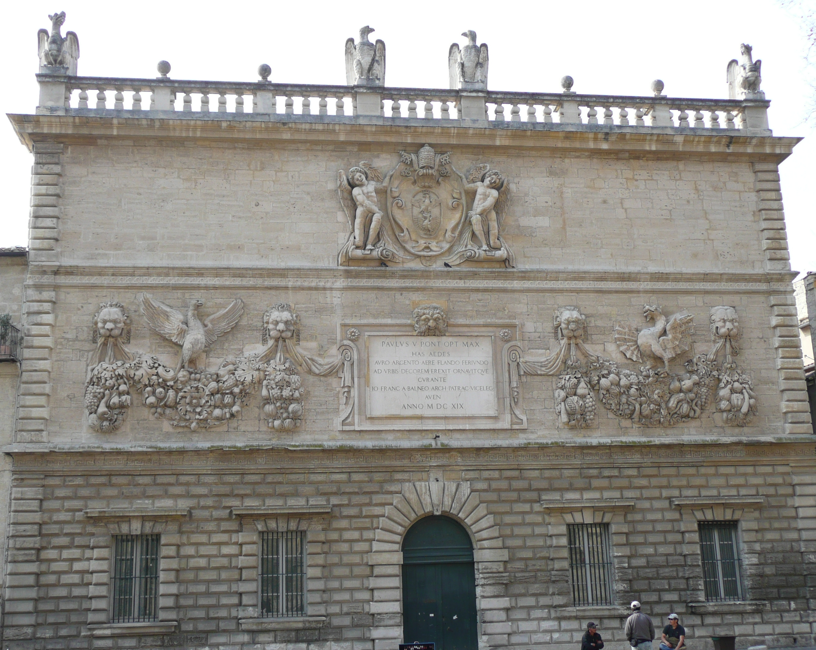 Bâtiment du 17e siècle servant désormais de siège au Conservatoire (à rayonnement régional) de Musique; façade classée M.H. par liste de 1862